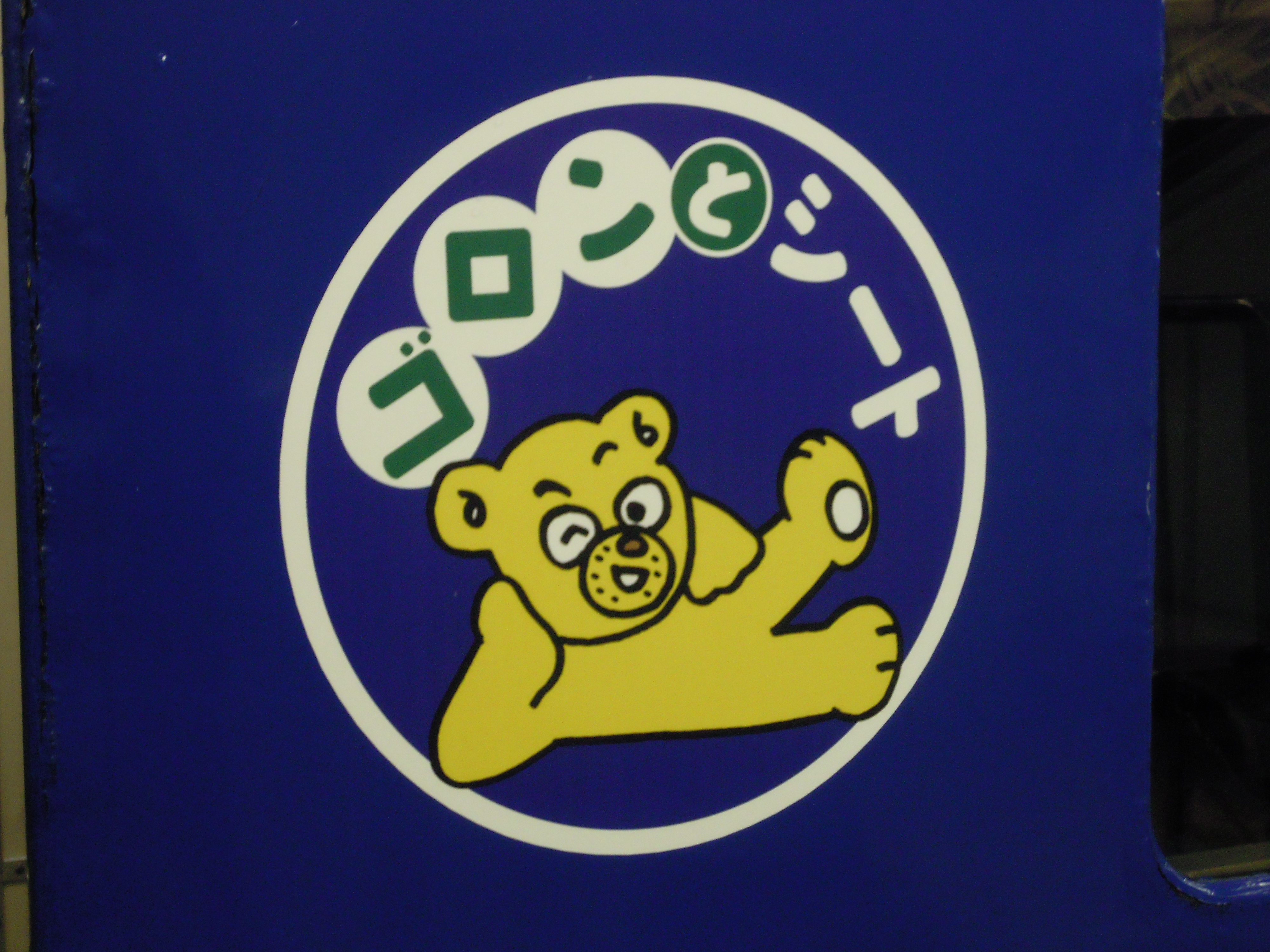 寝台特急「あけぼの」ゴロンとシート